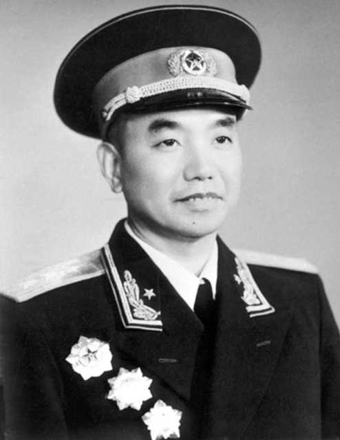 1955年，萧克被授予上将军衔